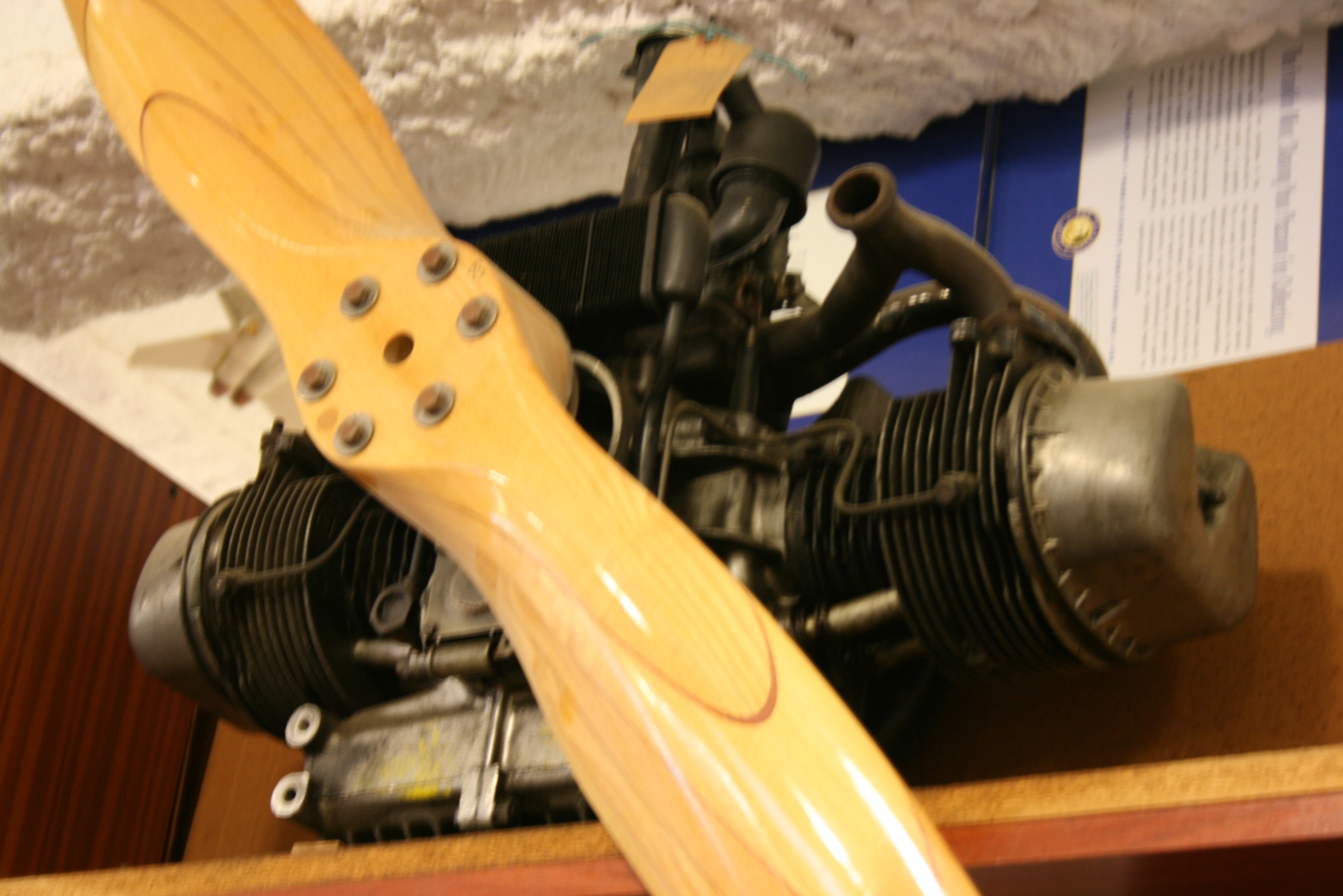 Motor avionitzat de 2CV existent en la llibreria l'Aeroteca de Barcelona